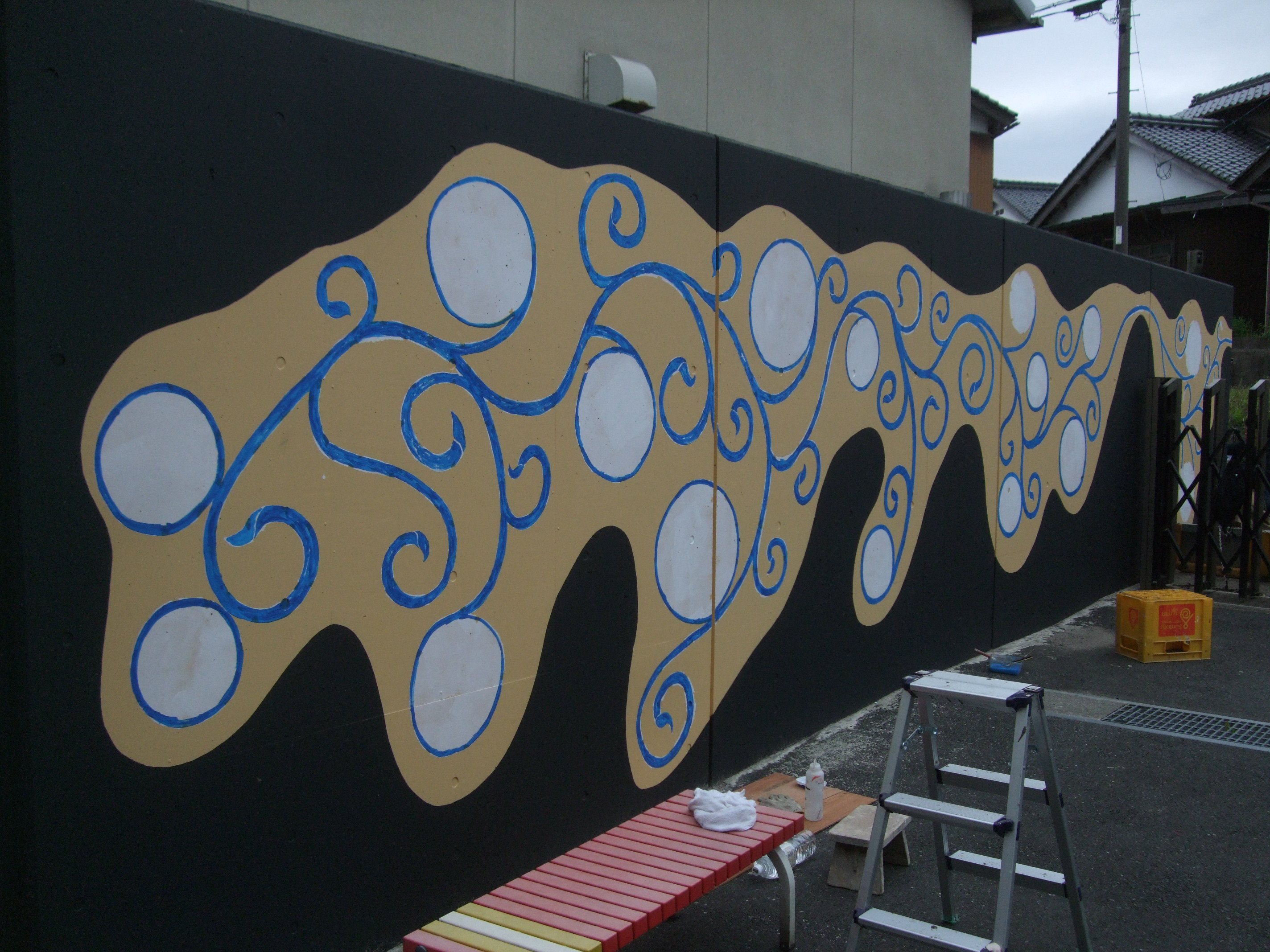 京都府京丹後市峰山町「日進製作所」と「こまねこまつり実行委員会」のコラボレーションによる企画で、制作・デザインはヒカリ美術館。壁画の唐草模様はメソポタミアやエジプトからシルクロードを通じて、日本に伝わり、途切れることなく伸び、生命力が強く、繁栄や長寿などの意味があり、日進製作所の未来と丹後の夢とビジョンを表している。 制作期間は２０１９年５〜６月